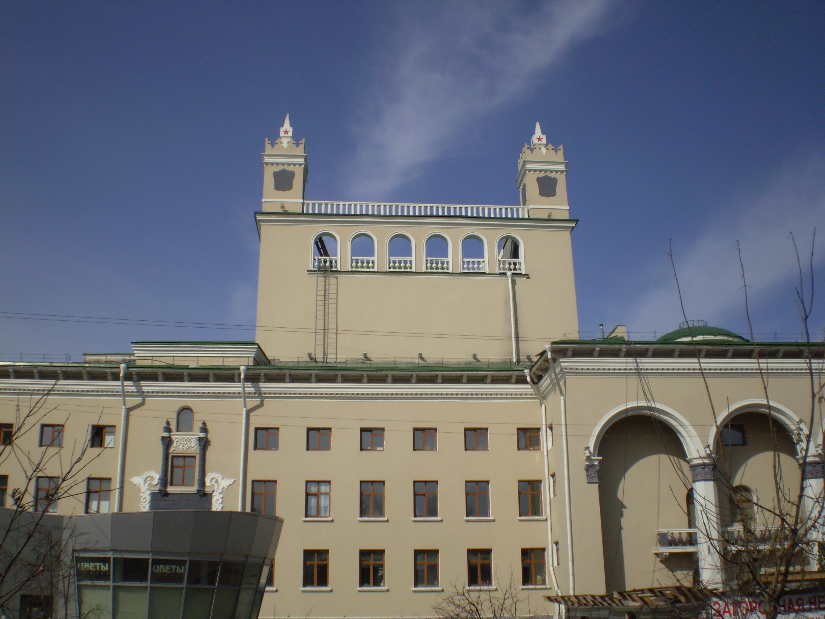 Бурятский академический театр оперы и балета. Западная сторона.